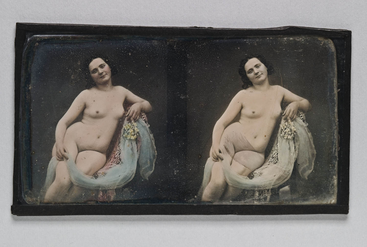 Dagerrotyp / daguerreotyp, handkolorerad stereoskopbild. Föreställer knäbild av sittande, naken, mörkhårig kvinna. Håller en blå slöja och en liten bukett gula blommor i handen. Påklistrad svart kantlist av papp. Med blyerts på baksidan: "Bergström Sthlm". Nordiska museet inv.nr 205467